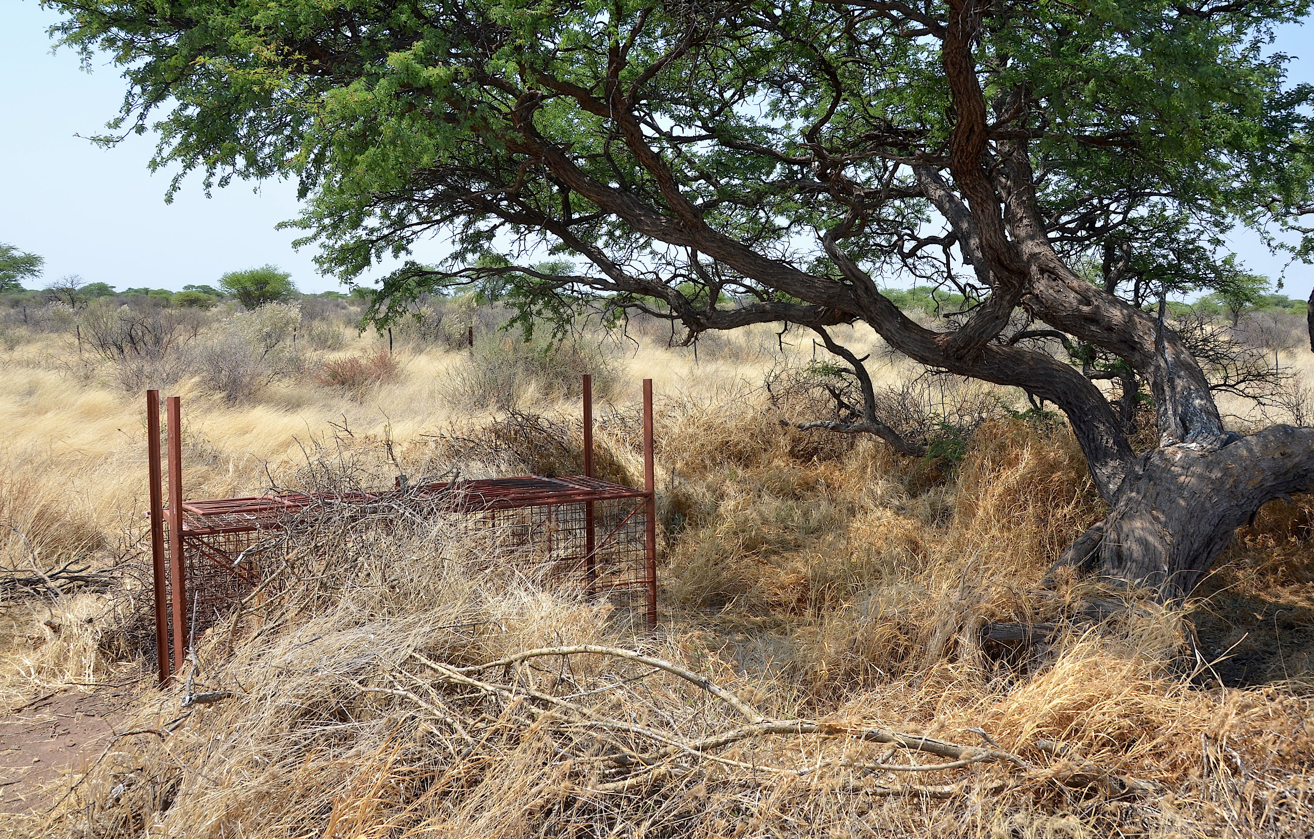 Raubtier-Falle auf Farm Eskadron in Namibia